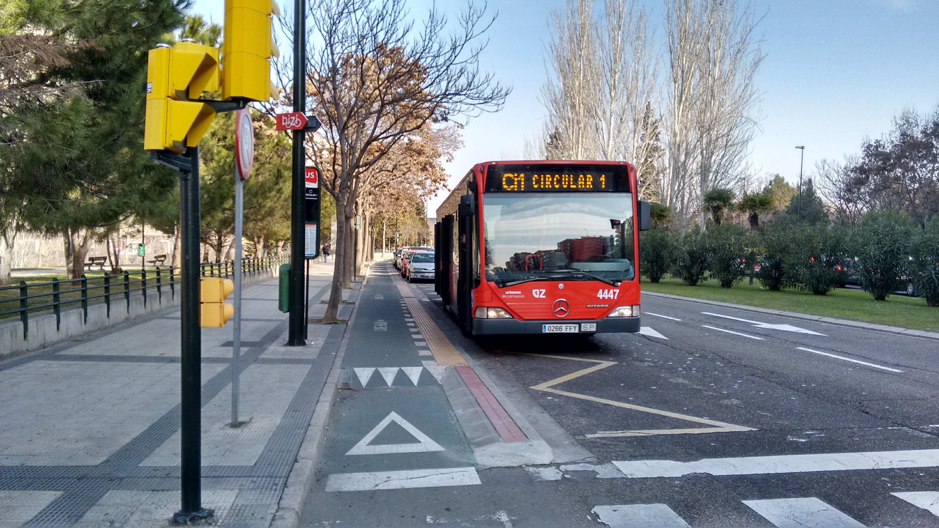 Bus 4447 de Auzsa, prestando servicio en la línea Ci1